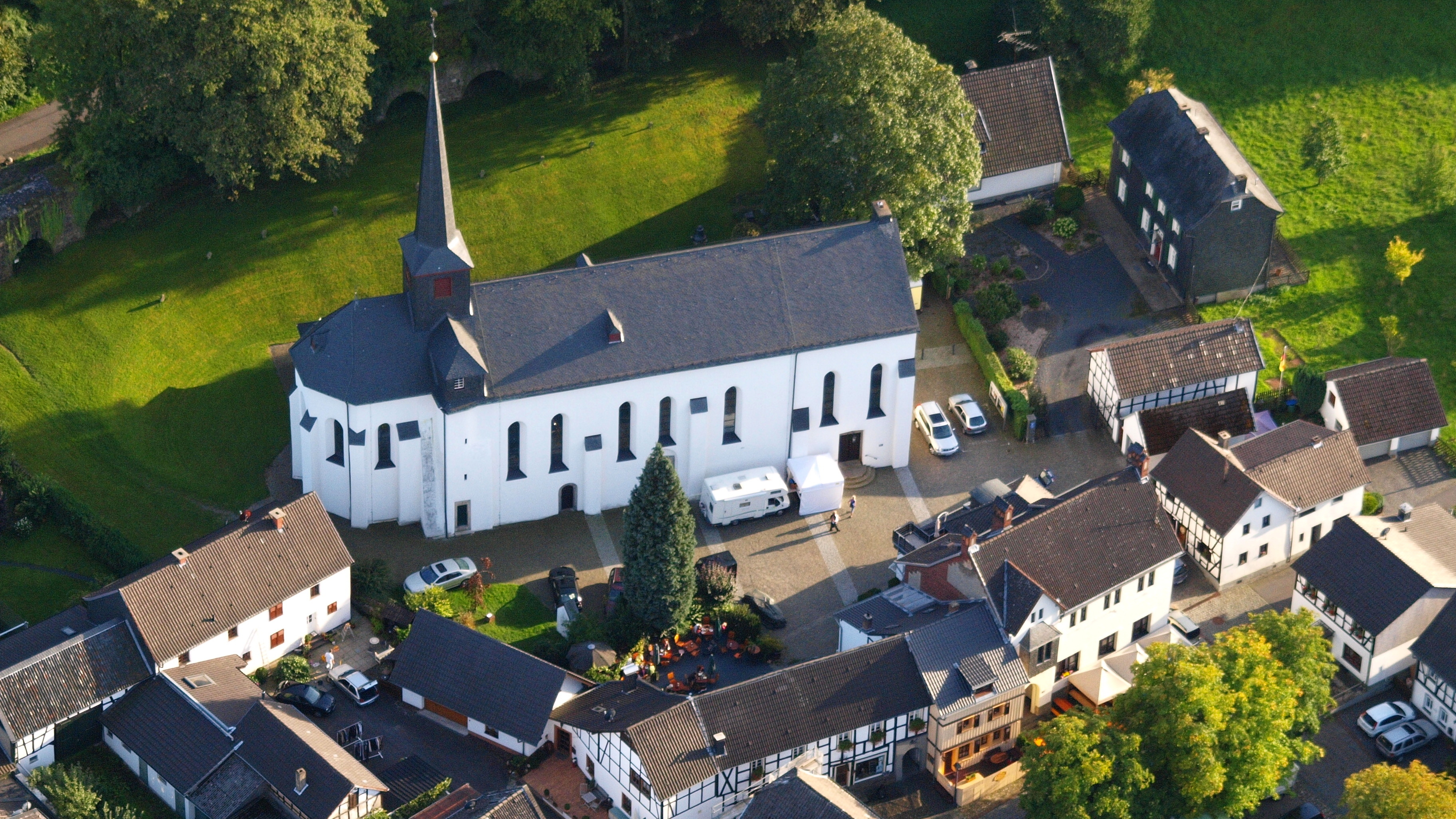 Hennef, Stadt Blankenberg, St. Katharina, Luftaufnahme